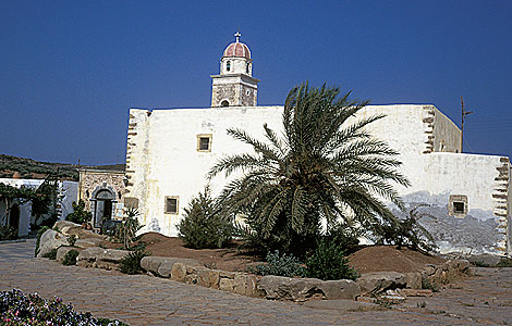 Kloster Toplou / Ostkreta